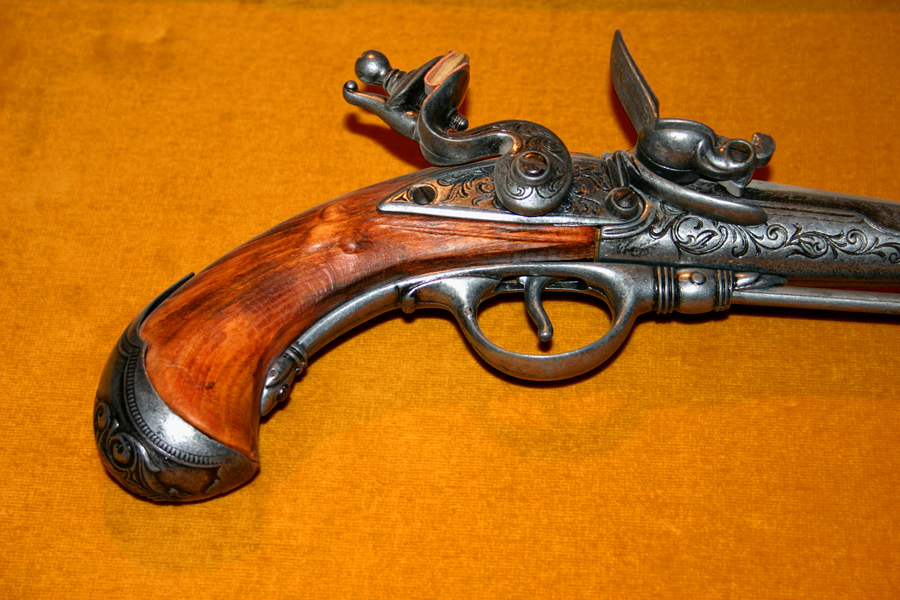 Titnaginis pistoletas su atlaužtu gaiduku su titnagu.